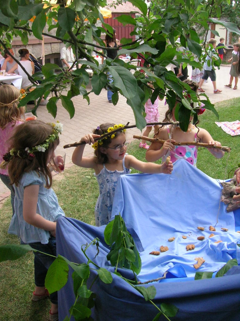 johana festo en valdorfa infanĝardeno (tiu de Groß-Umstadt en Hesio, Germanio) Fonto: propra foto